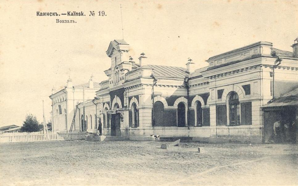 Старый вокзал железнодорожной станции Каинск-Томский. Начало XX века (1905). Часть вокзала (справа от ресторана) площадью 60 кв. саж. построен в 1896 г. Восточная часть площадью 40 кв. саж. построена в 1898-1901 гг. Аналогичный вокзал был на ст. Курган. Открытое письмо (Carte Postale)